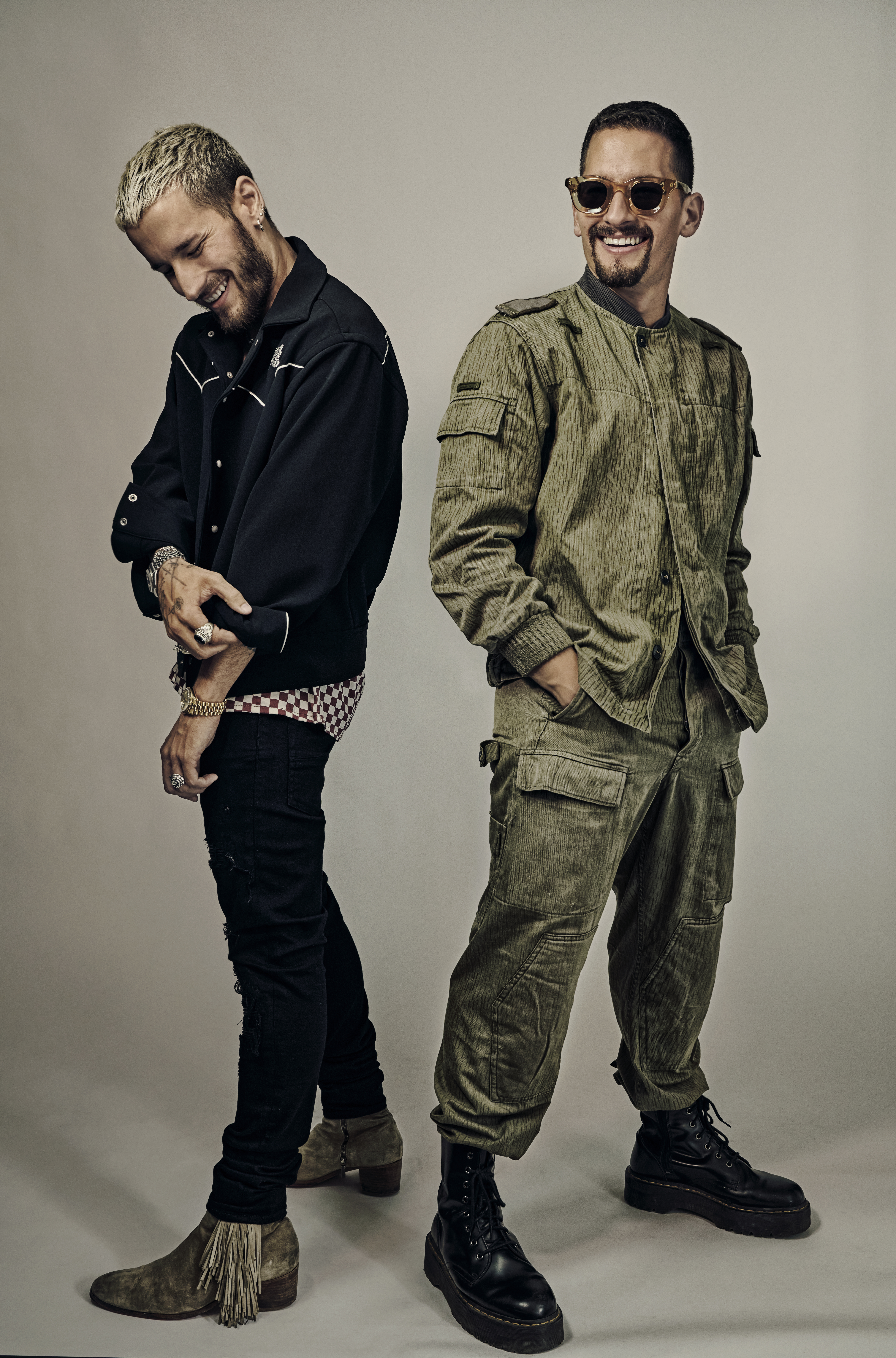 Mau & Ricky en una sesión de fotos promocional